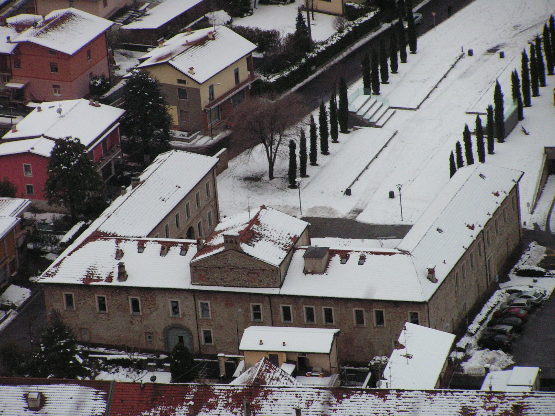 Foto di Palazzo Francesconi, sede del Municipio di Provaglio d'Iseo, scattata dal Monte Cognolo